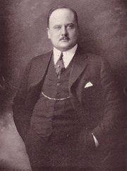 Portrait of Pasquale Simonelli (1878-1960). Foto di proprietà personale